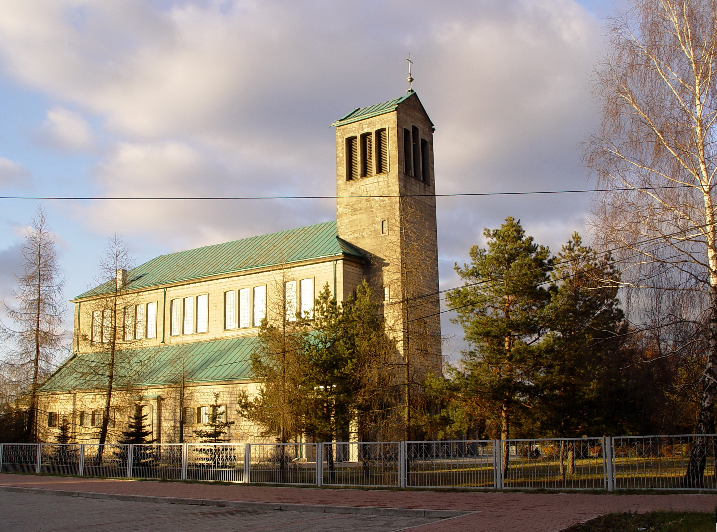 Kosciół pw. Wniebowięcia Najświętszej Marii Panny w Stąporkowie. widok od południowego-wschodu (lokalizacja na WikiMapii